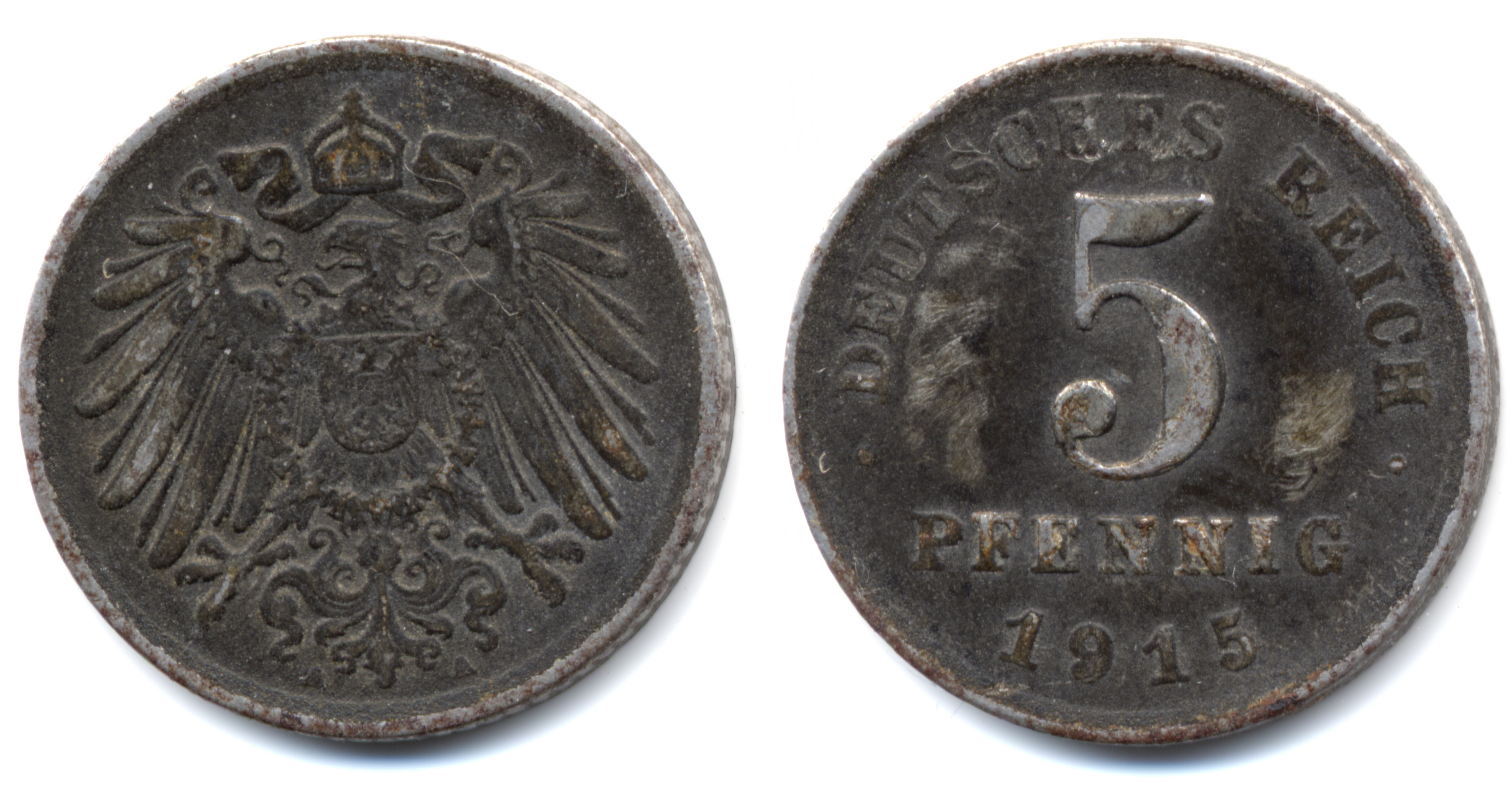 5 Pfennig iron coin Deutsches Reich 1915